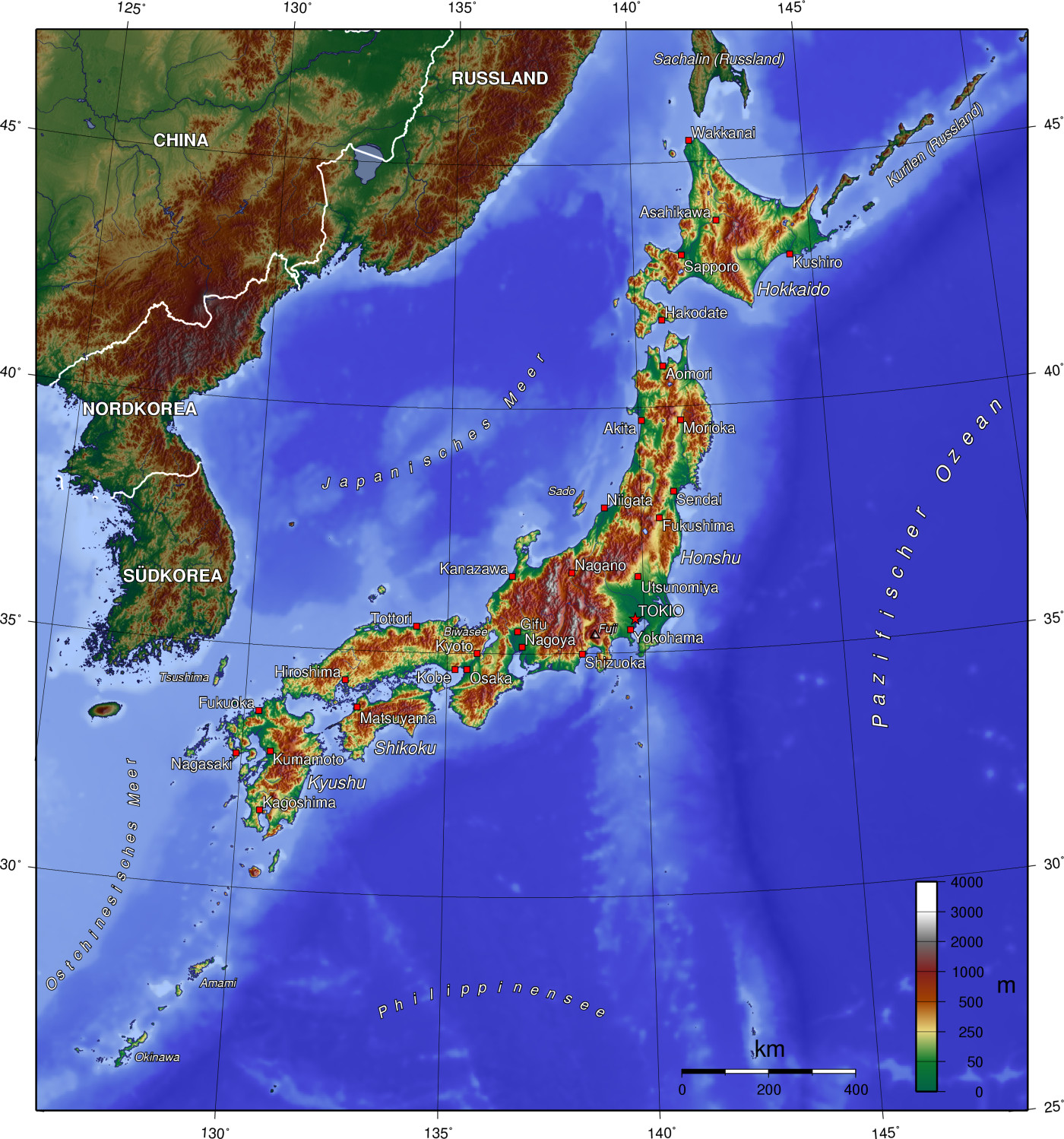 Topografische Karte von Japan